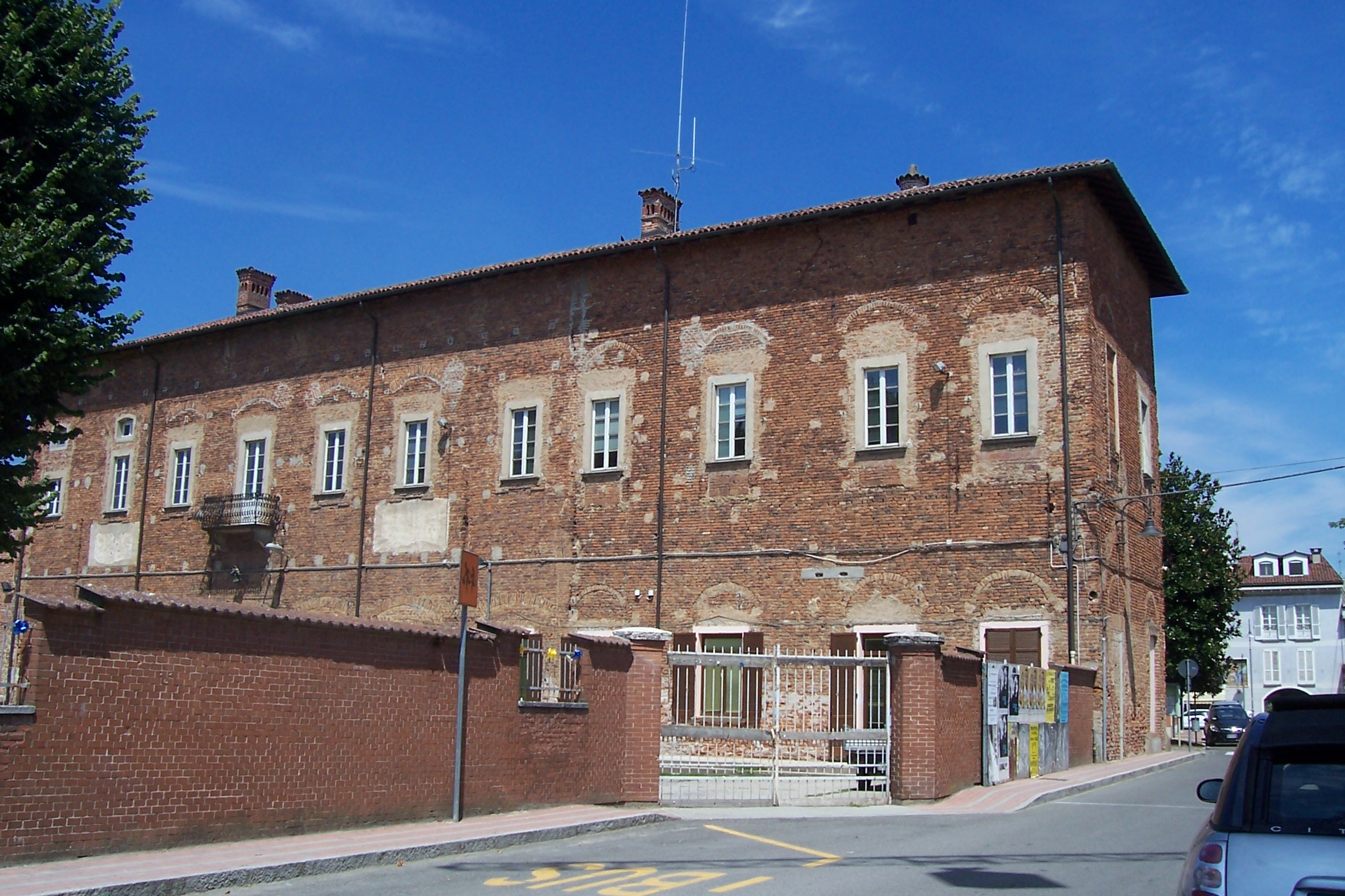 Corteolona (Pavia), il municipio nel castello visconteo